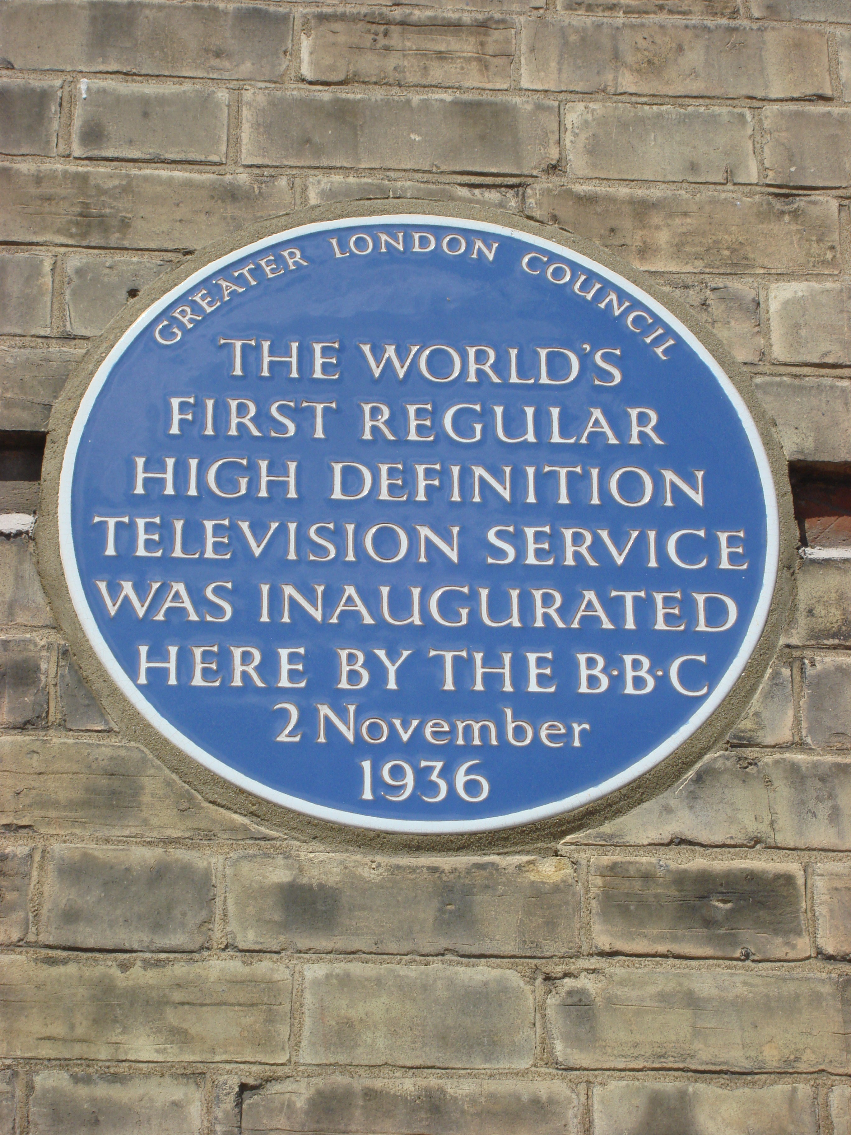 Alexandra Palace